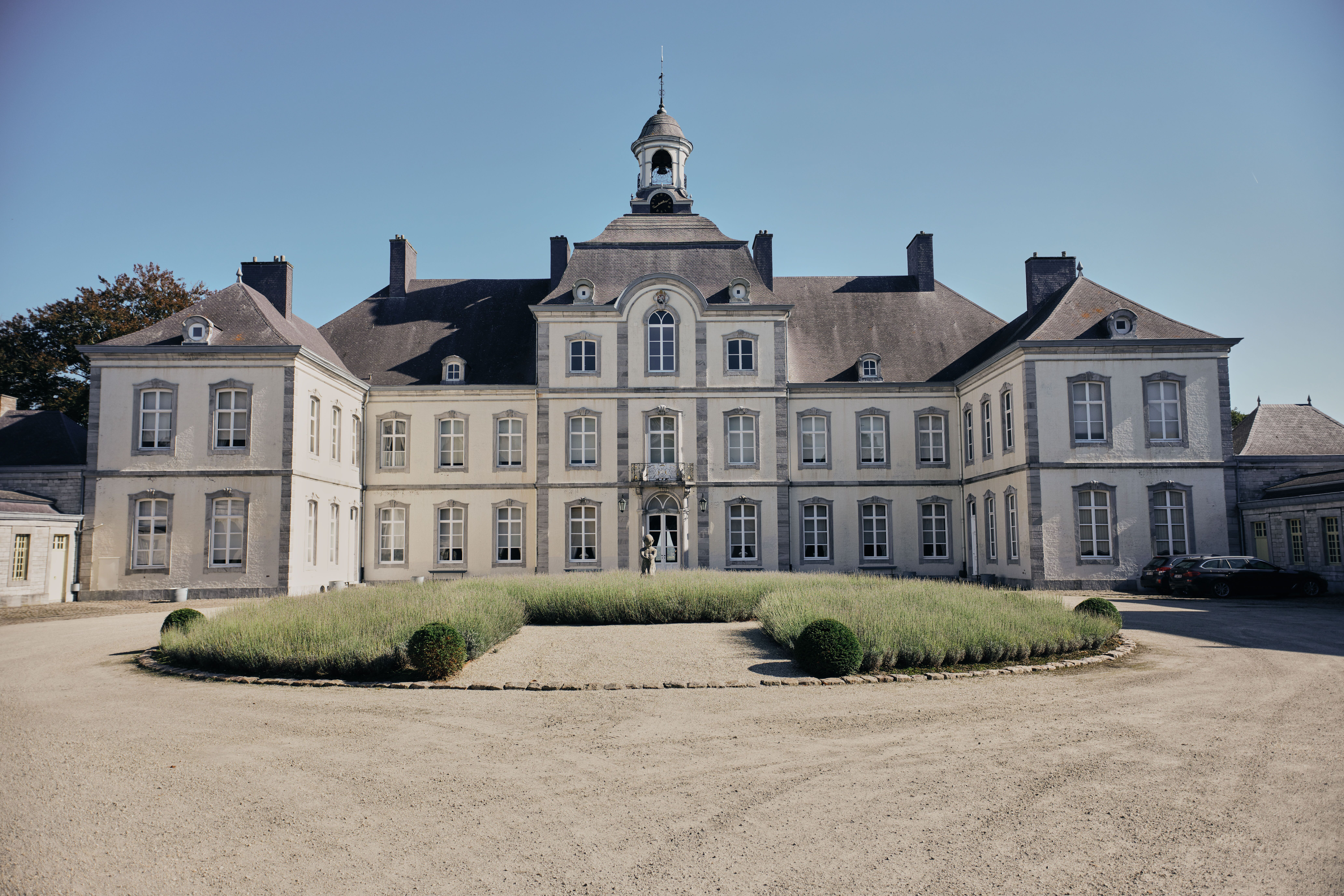 Château de Warfusée, 1755.